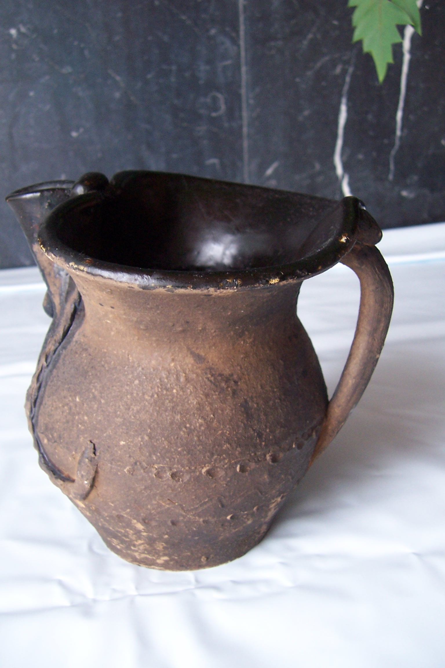 Jarra de barro negro, adquirida en un alfar de la provincia de Lugo en Galicia (España). La llaman jarra de los bigotes y se cree que es de tradición celta.